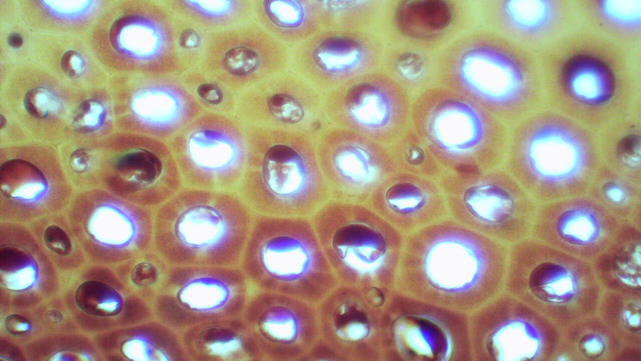 胞间连丝，柿子。